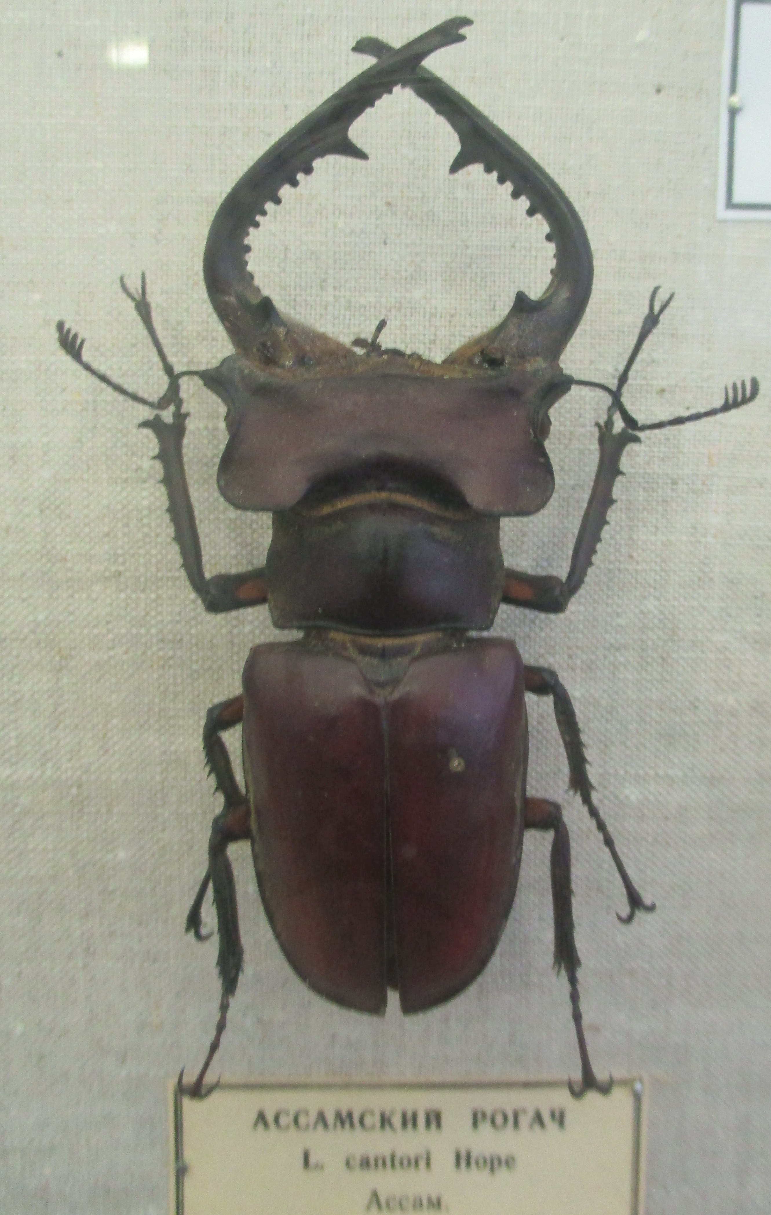 Musée zoologique de Saint-Pétersbourg: Lucanus cantori originaire de l'Assam.